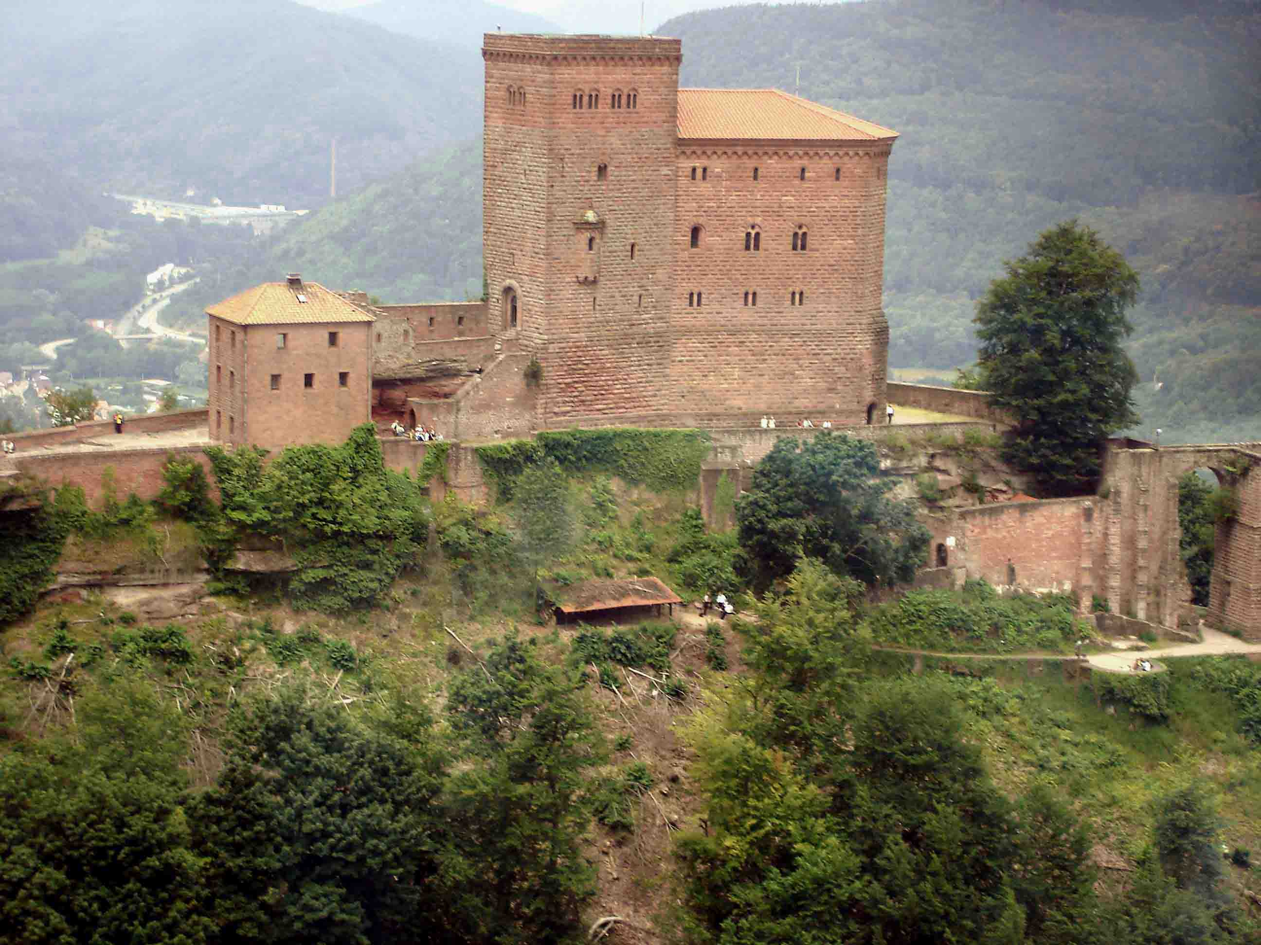 Trifels - aus der Hubschrauberperspektive